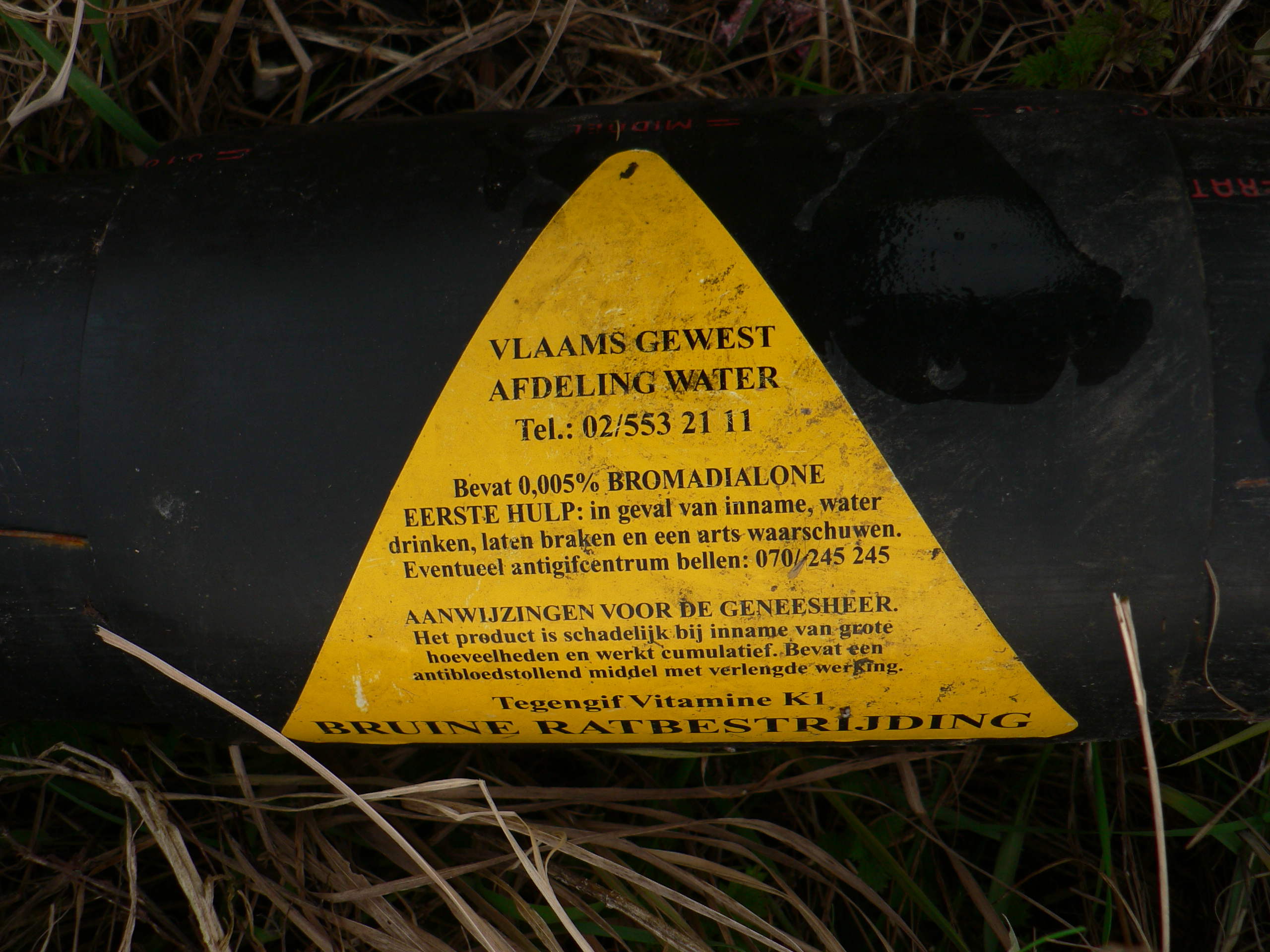 rat poison on the Schelde river dike, Steendorp, Belgium